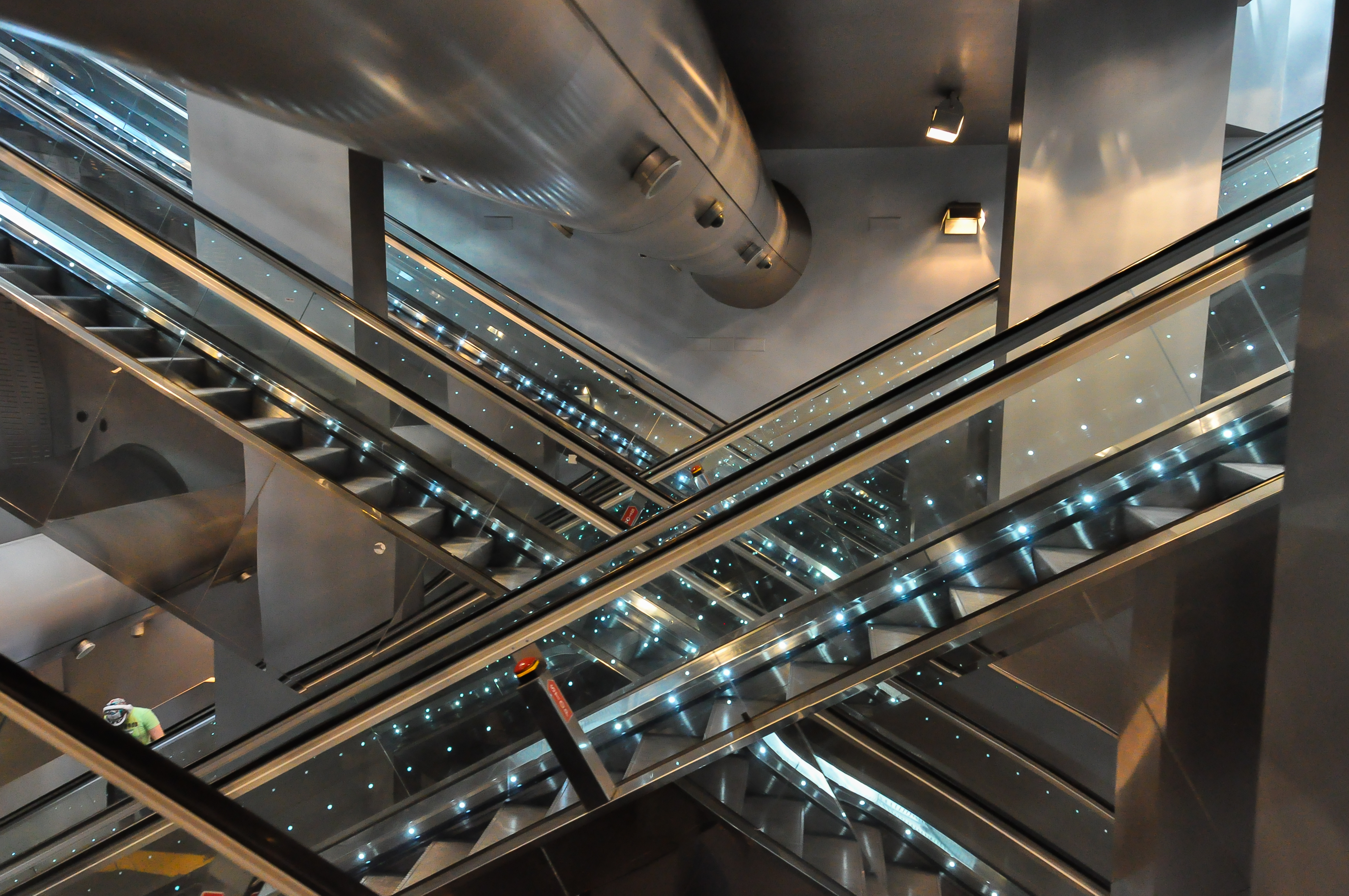 Stazione di Napoli Piazza Garibaldi - Naples Garibaldi Piazza station